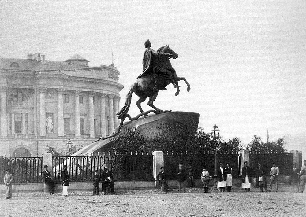 Петербург